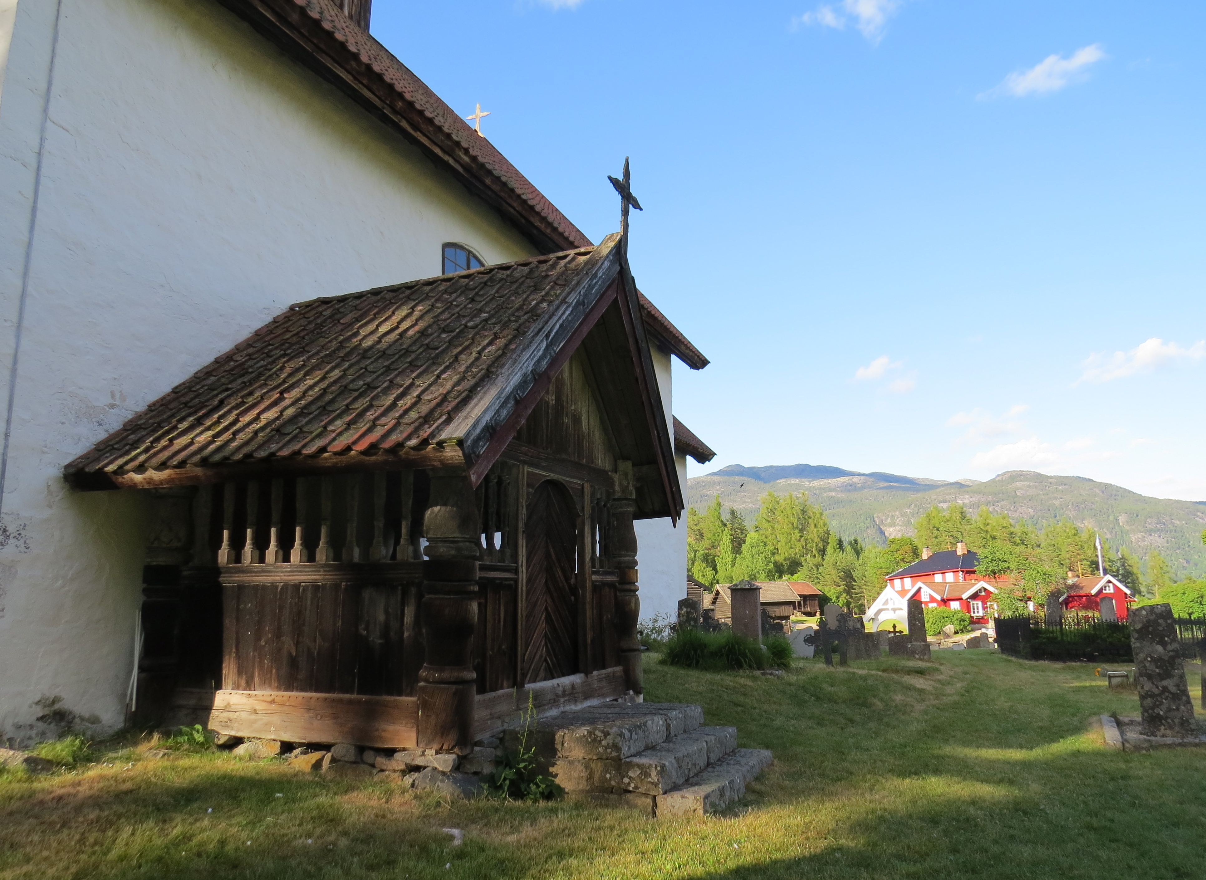 Indgangsparti fra Kviteseid Kirke, Telemark